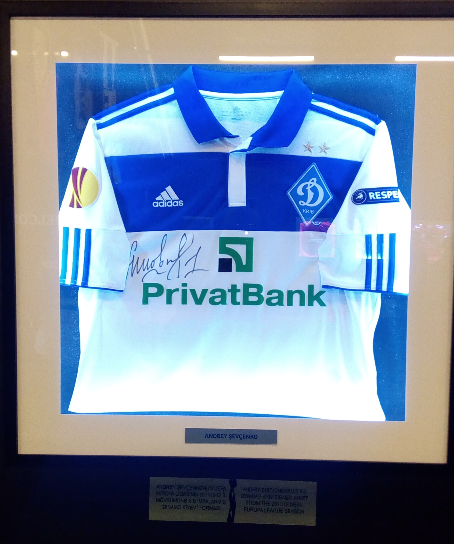 Avropa Liqası Muzeyi Bakıda